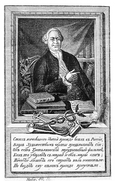 Изображение В.К. Тредиаковского (1703 - 1769)